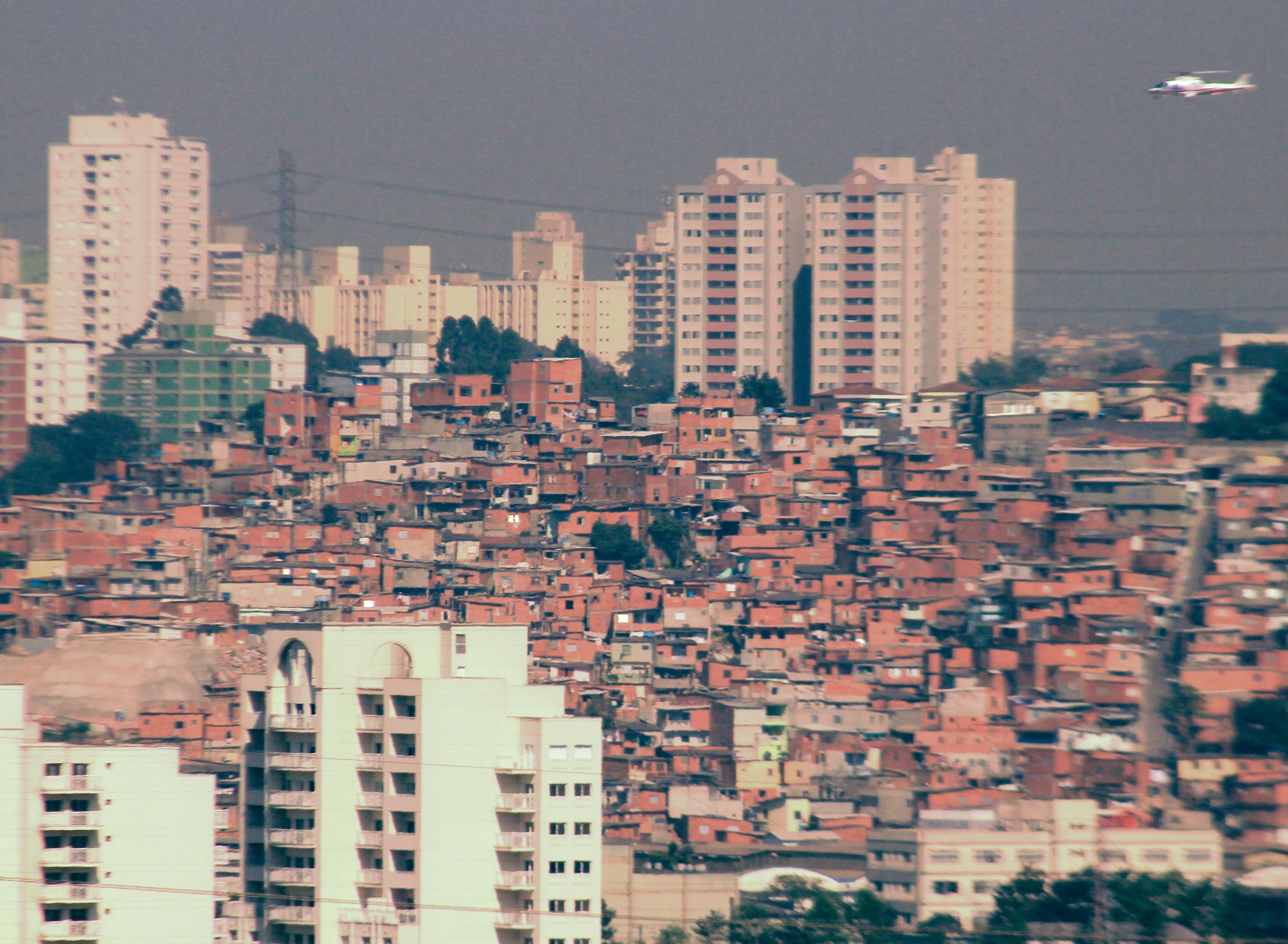 Uma favela entre edifícios residenciais na cidade de São Paulo, Brasil.